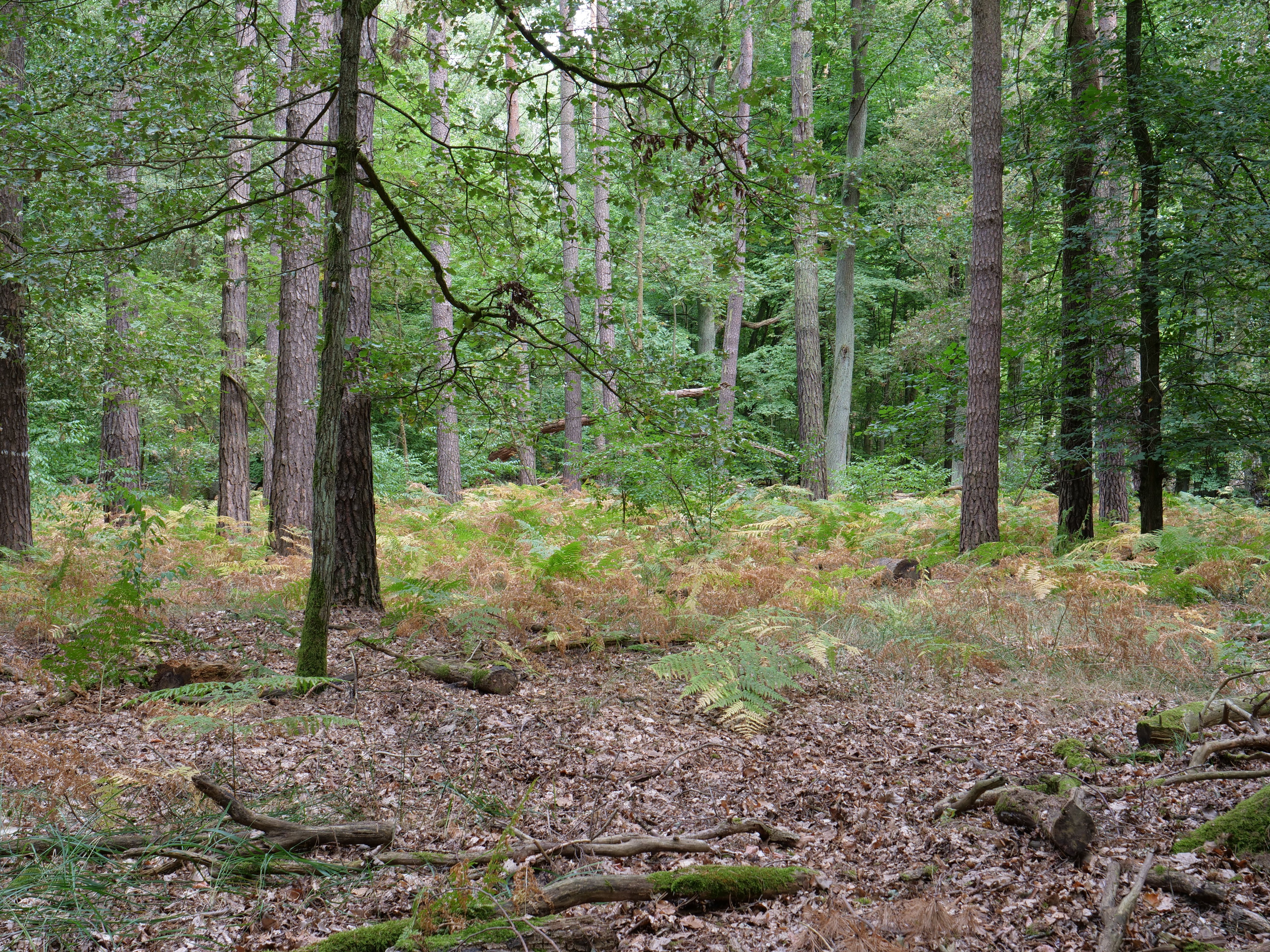 Alter bodensaurer Eichenwald auf Sandebenen mit Quercus robur(LRT 9190) im Spandauer Forst.